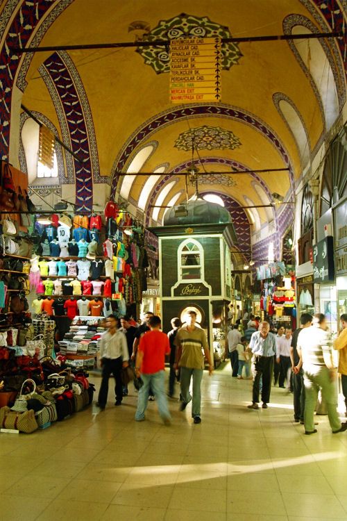 Isztambul, Fedett Bazár